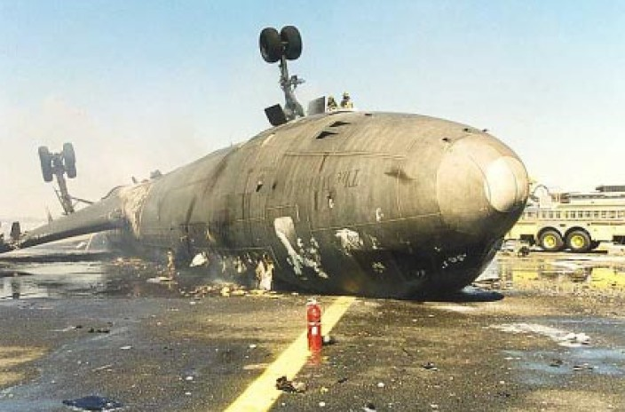 Fedex Flight 14（N611FE） wreckage2